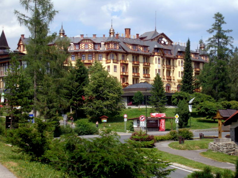 Centrum mesta Vysoké Tatry,Starý Smokovec-secesný Hotel Grand, z roku 1904 autor: Guido Hoepfner.